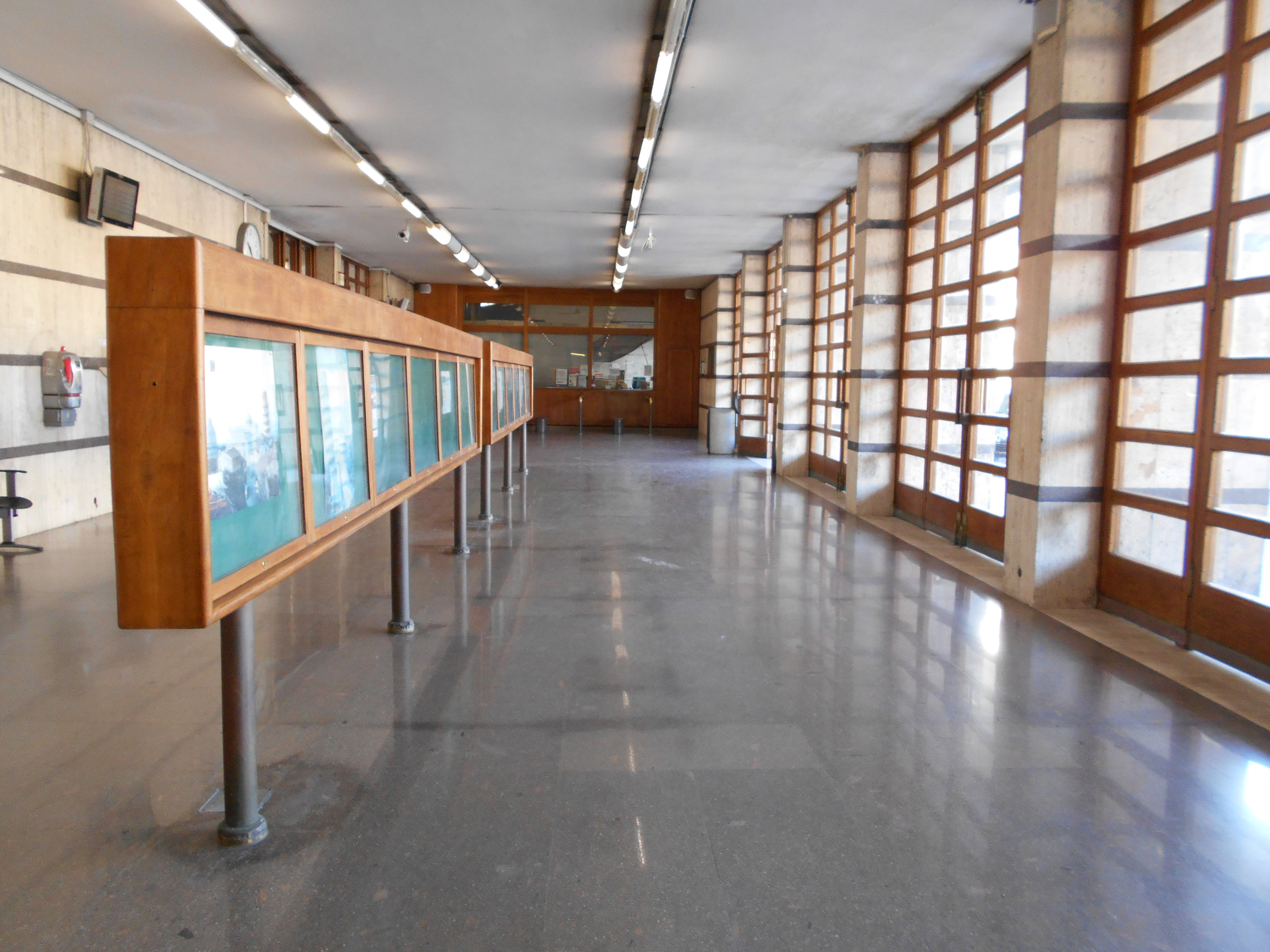 Salone delle partenze, stazione, Montecatini Terme